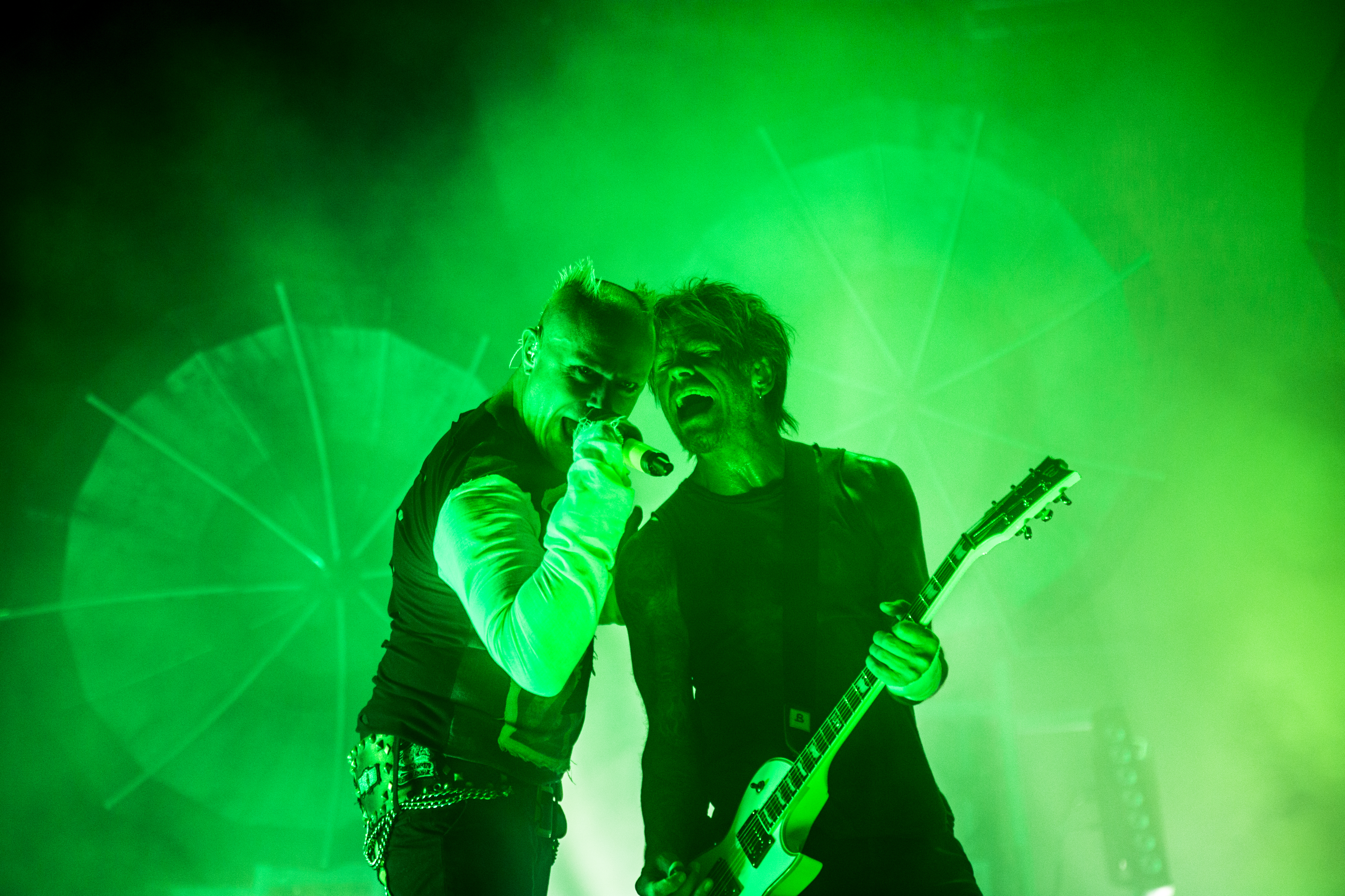 FIB 2015 The Prodigy